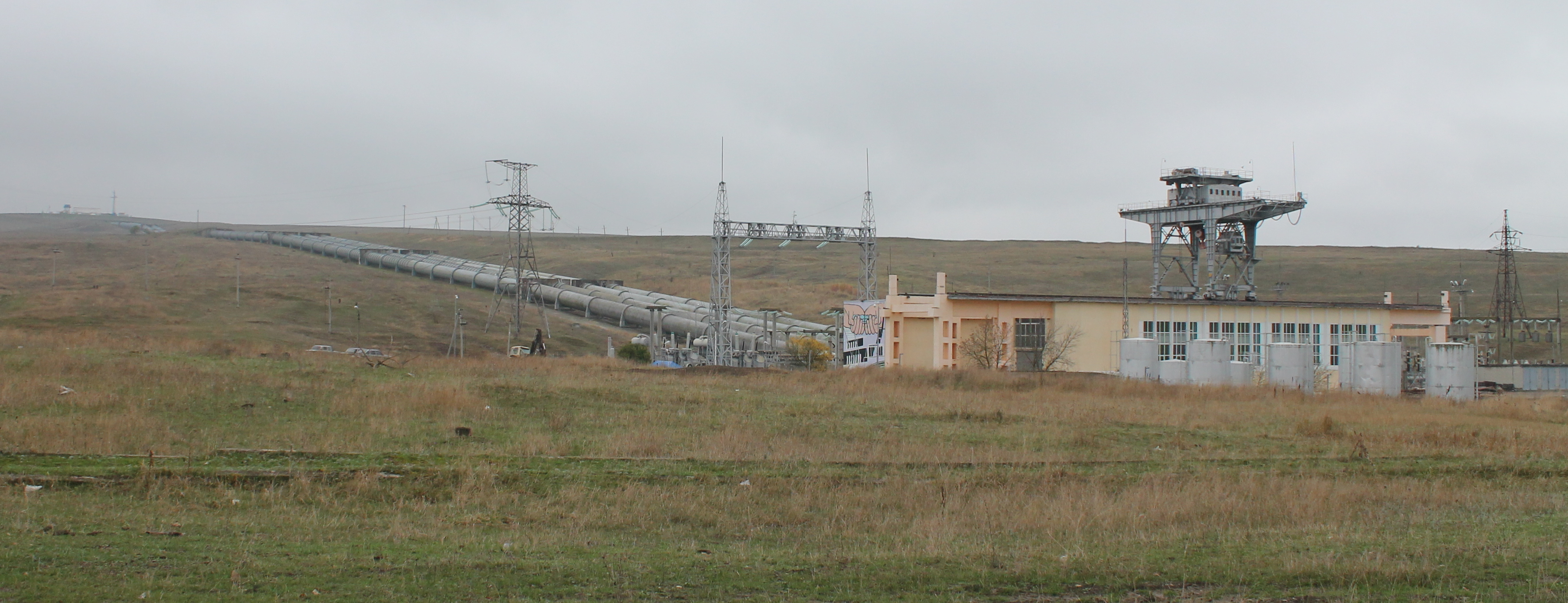 Общий вид Кубанской ГЭС-2